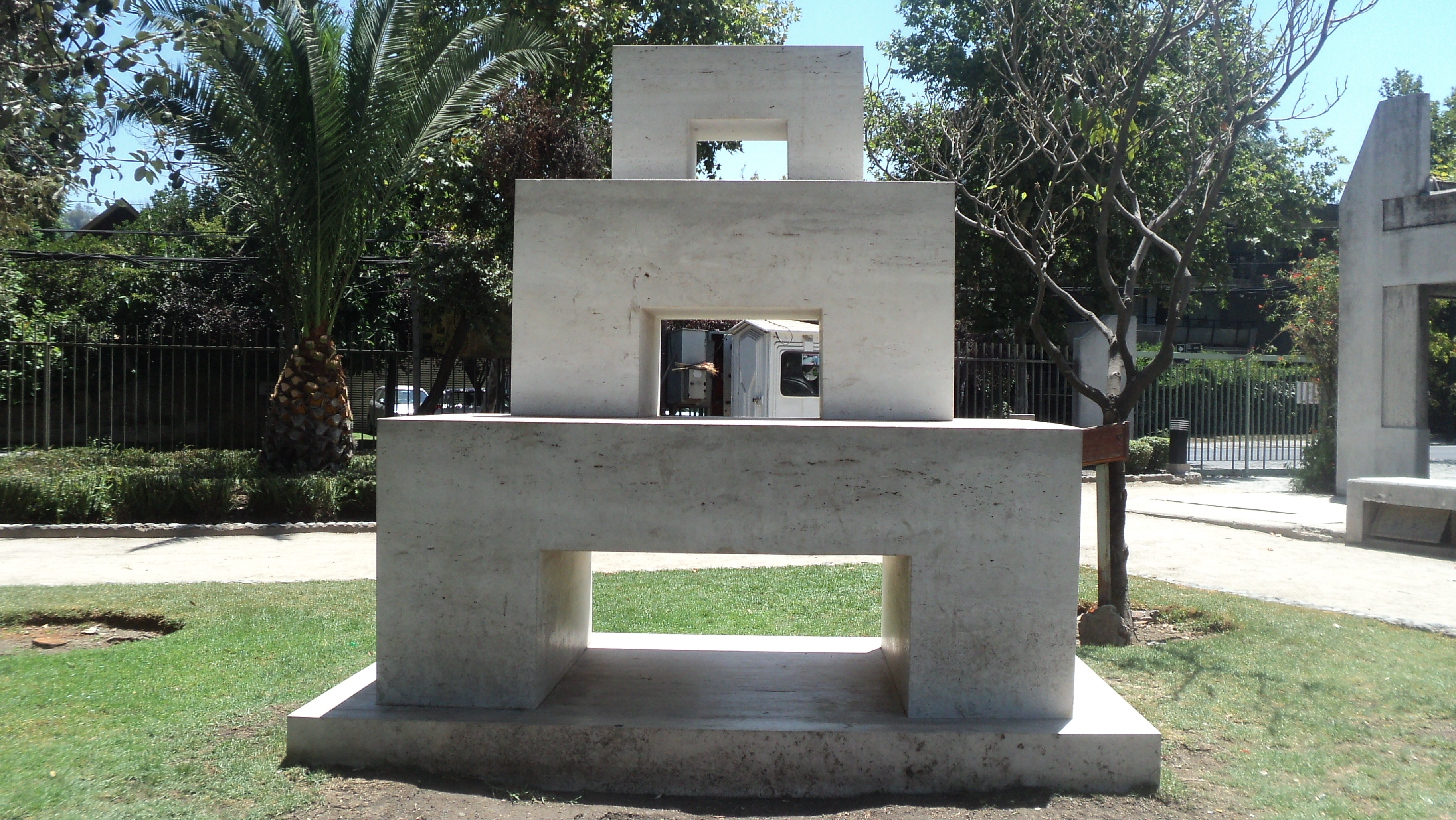 Imagen para el Bicentenario, de la escultora chilena Lily Garafulic; Parque de las Esculturas de Providencia, Santiago de Chile. Desde la abstracción simboliza al ser humano como centro de la naturaleza.